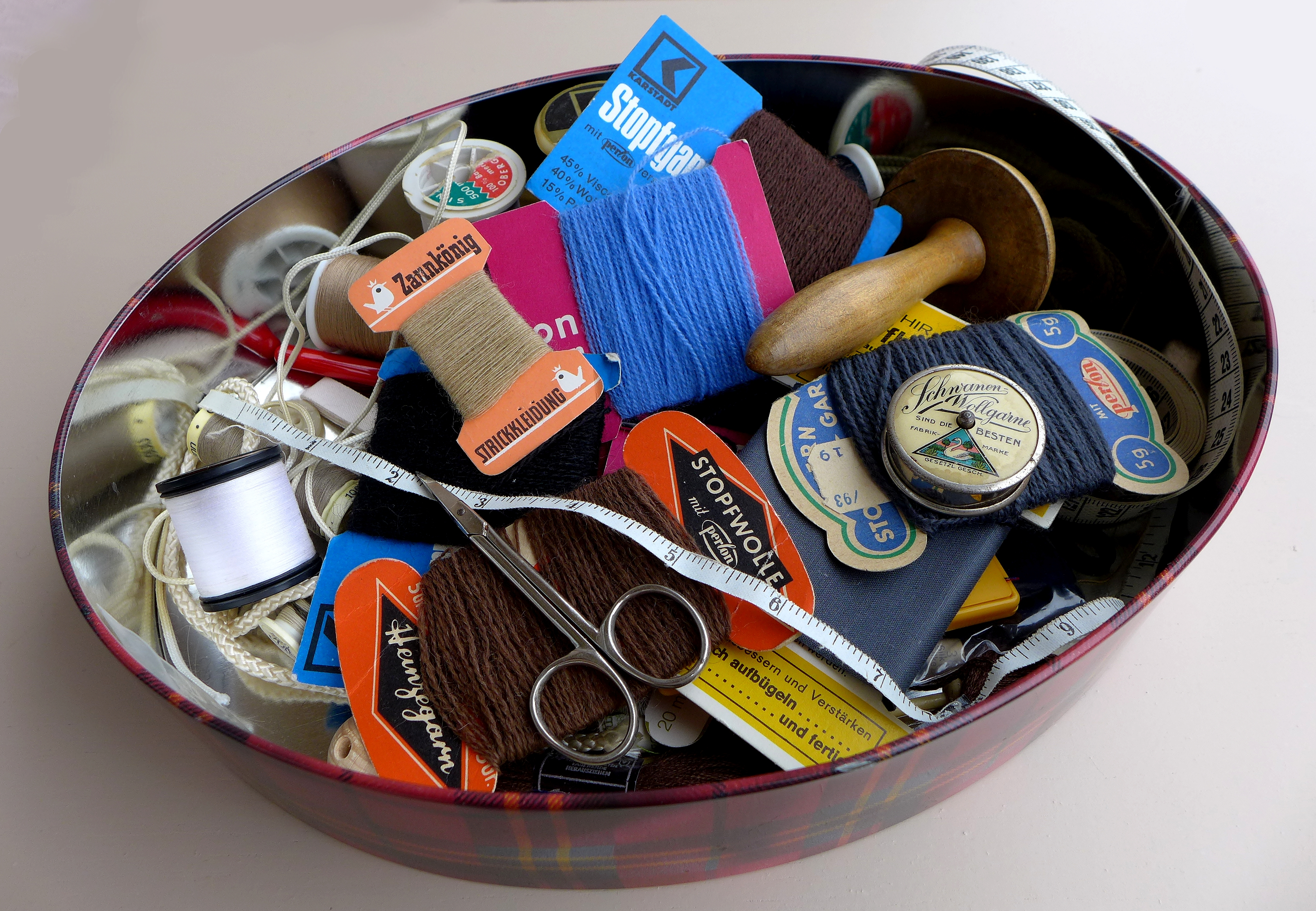 Nähzeug der vergangenen 60 Jahre aufbewahrt in einer Keksdose. Aufnahmedatum 2016-07.